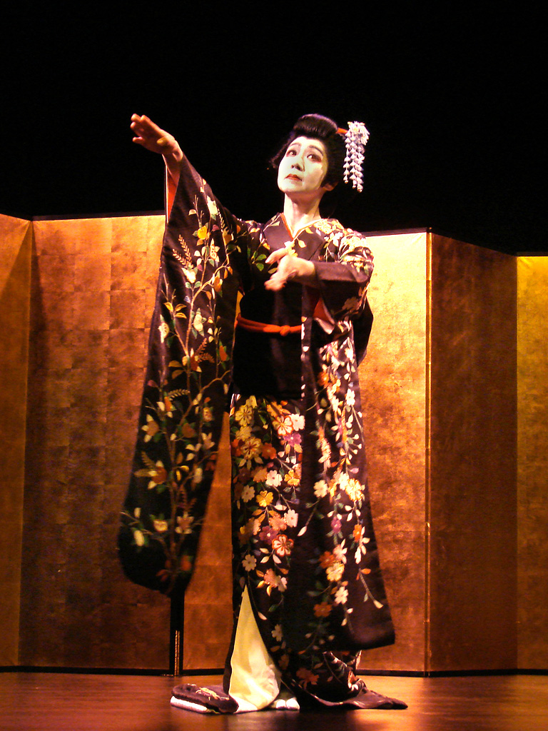 Eiko Hayashi Nihon Buyô – danse du Kabuki (Japon) accompagnée par Nobuko Matsumiya (koto) et Fumie Hihara (koto, shamisen) Auditorium du Musée Guimet samedi 22 novembre 2008